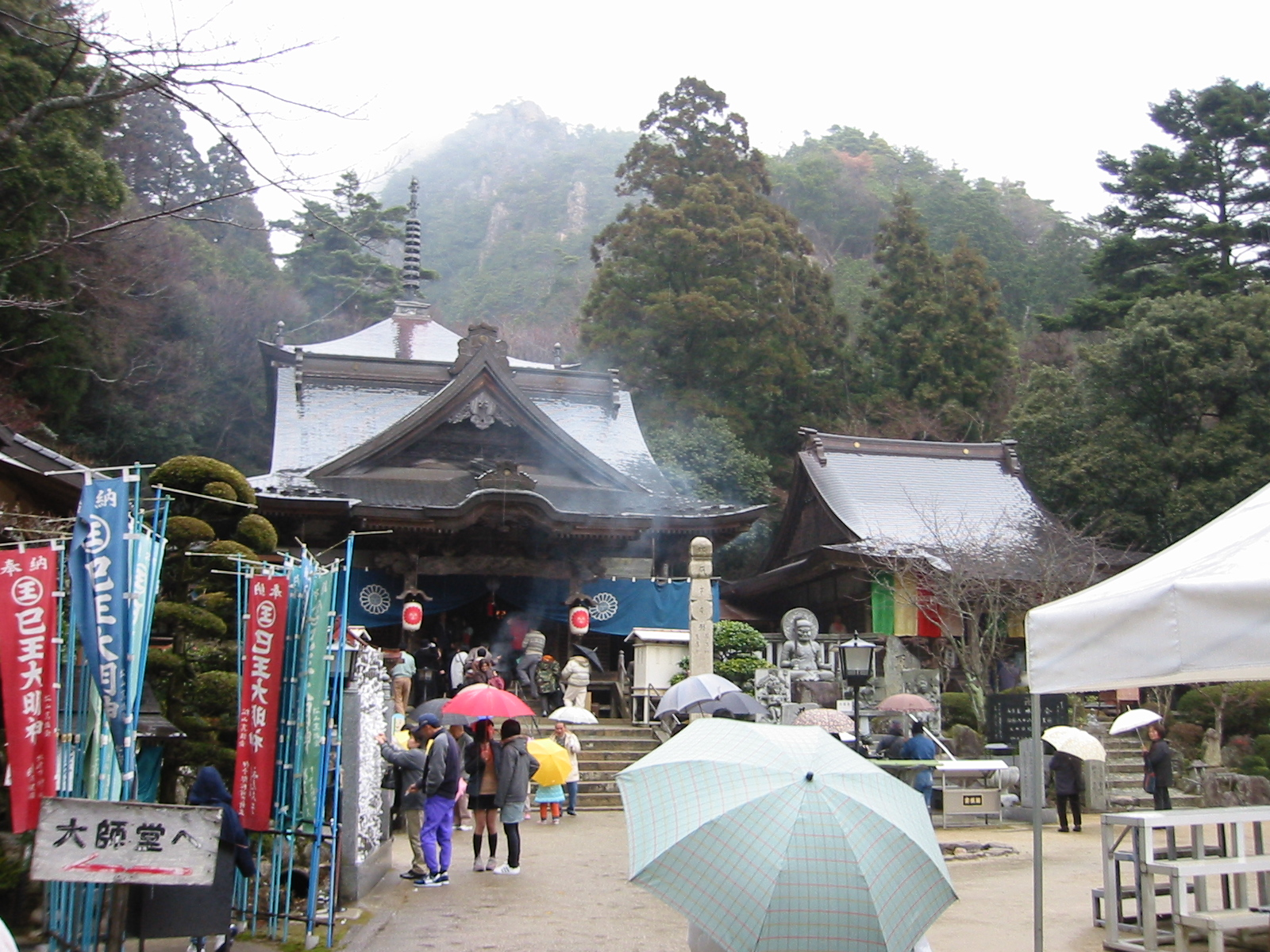 八十八番札所 大窪寺